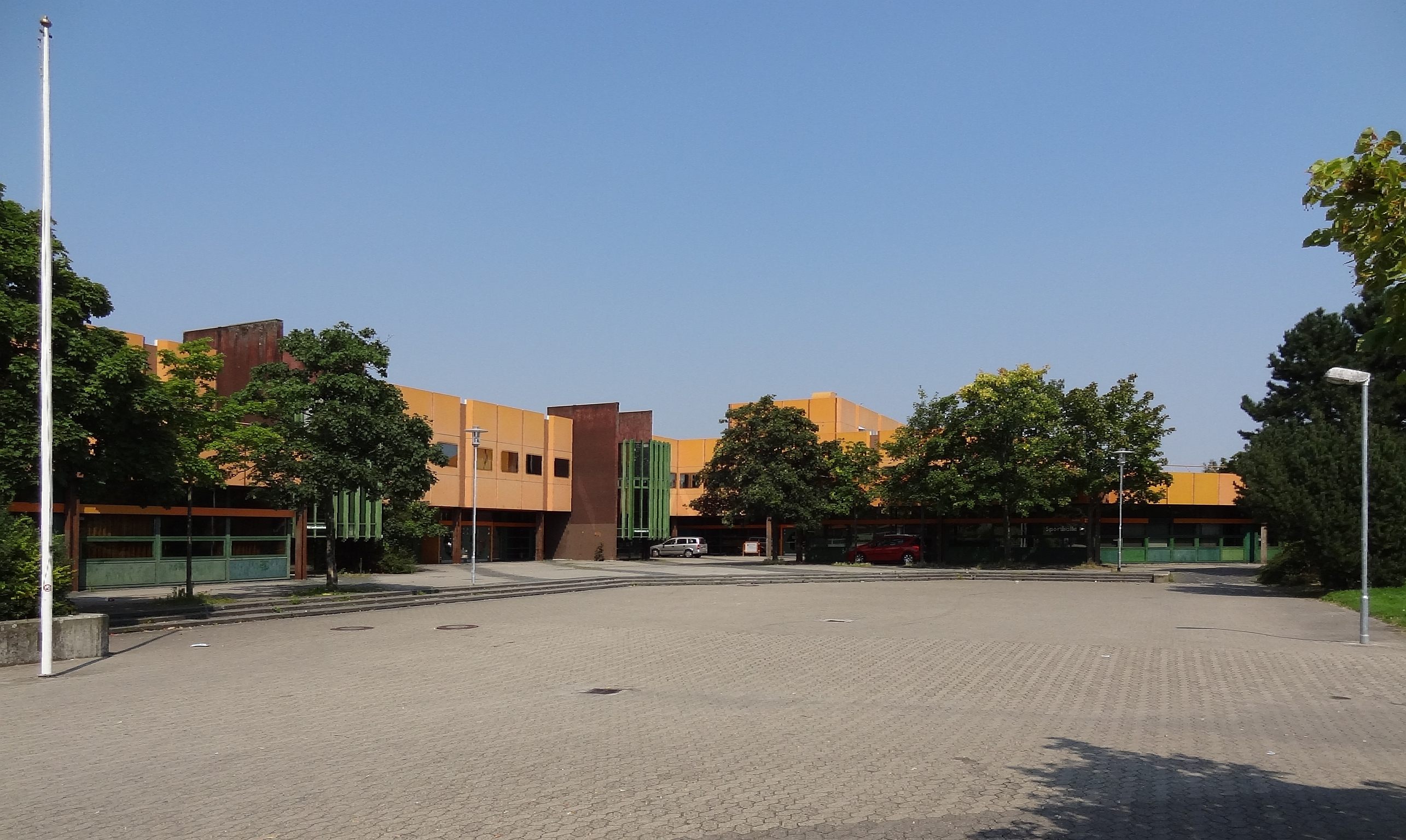 Eingangsbereich der Wilhelm-Bracke-Gesamtschule am Alsterplatz in Braunschweig.